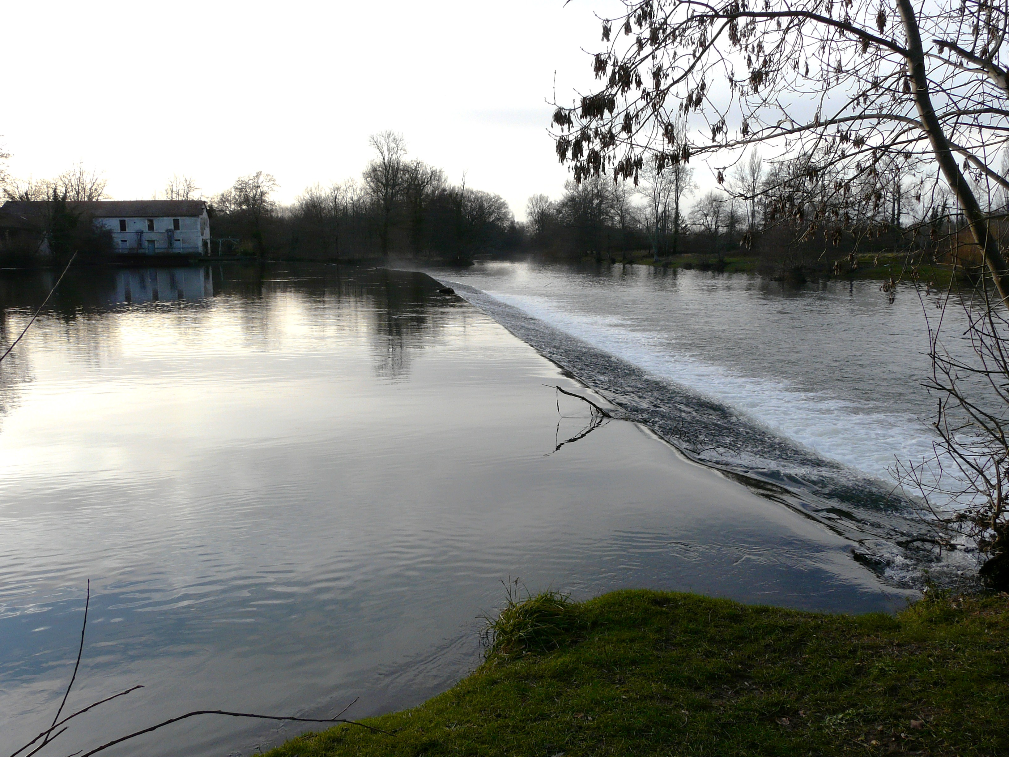 Barrage de Ménestérol sur l'Isle, Montpon-Ménestérol, Dordogne, France